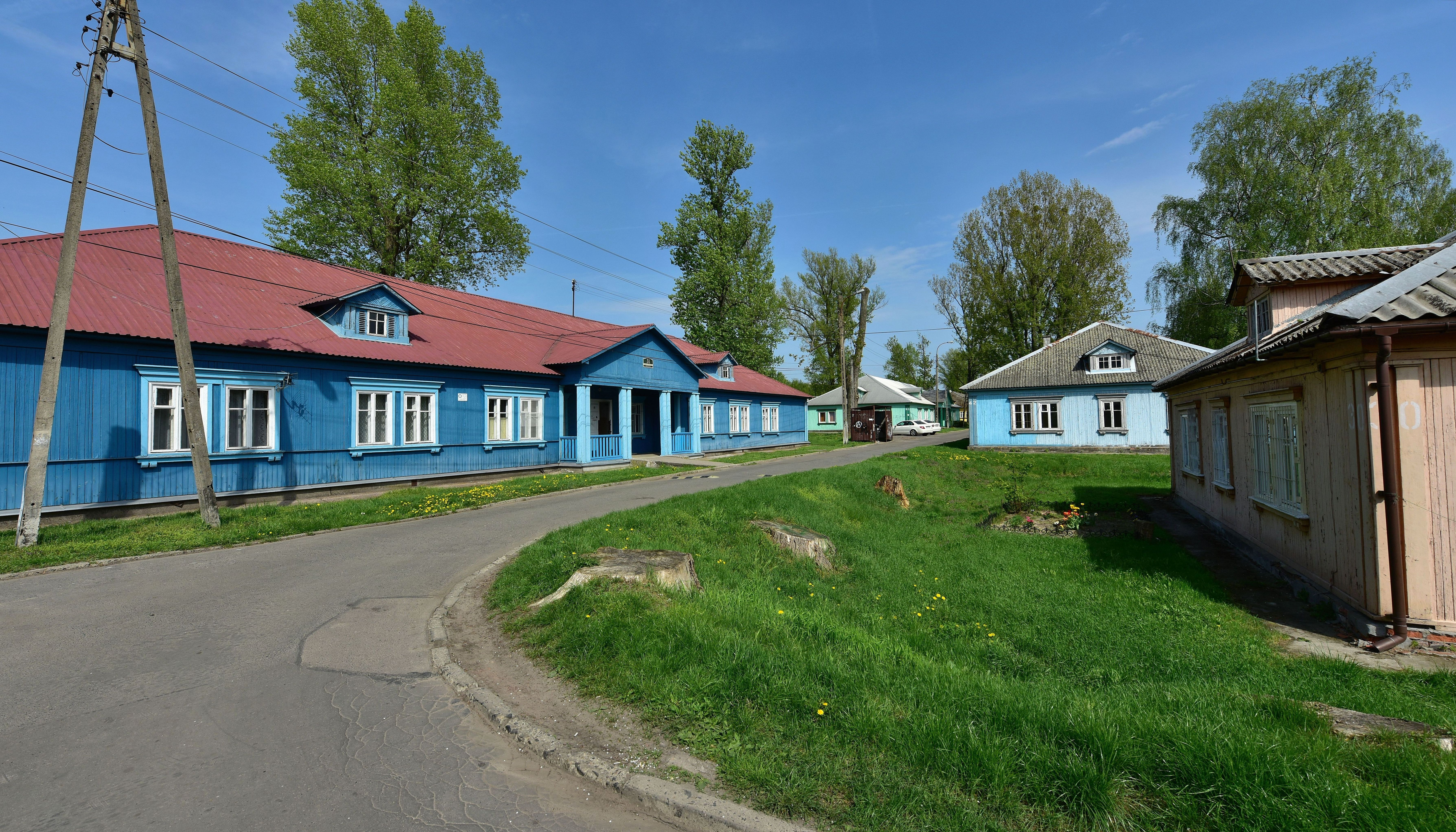 Osiedle Przyjaźń w Warszawie